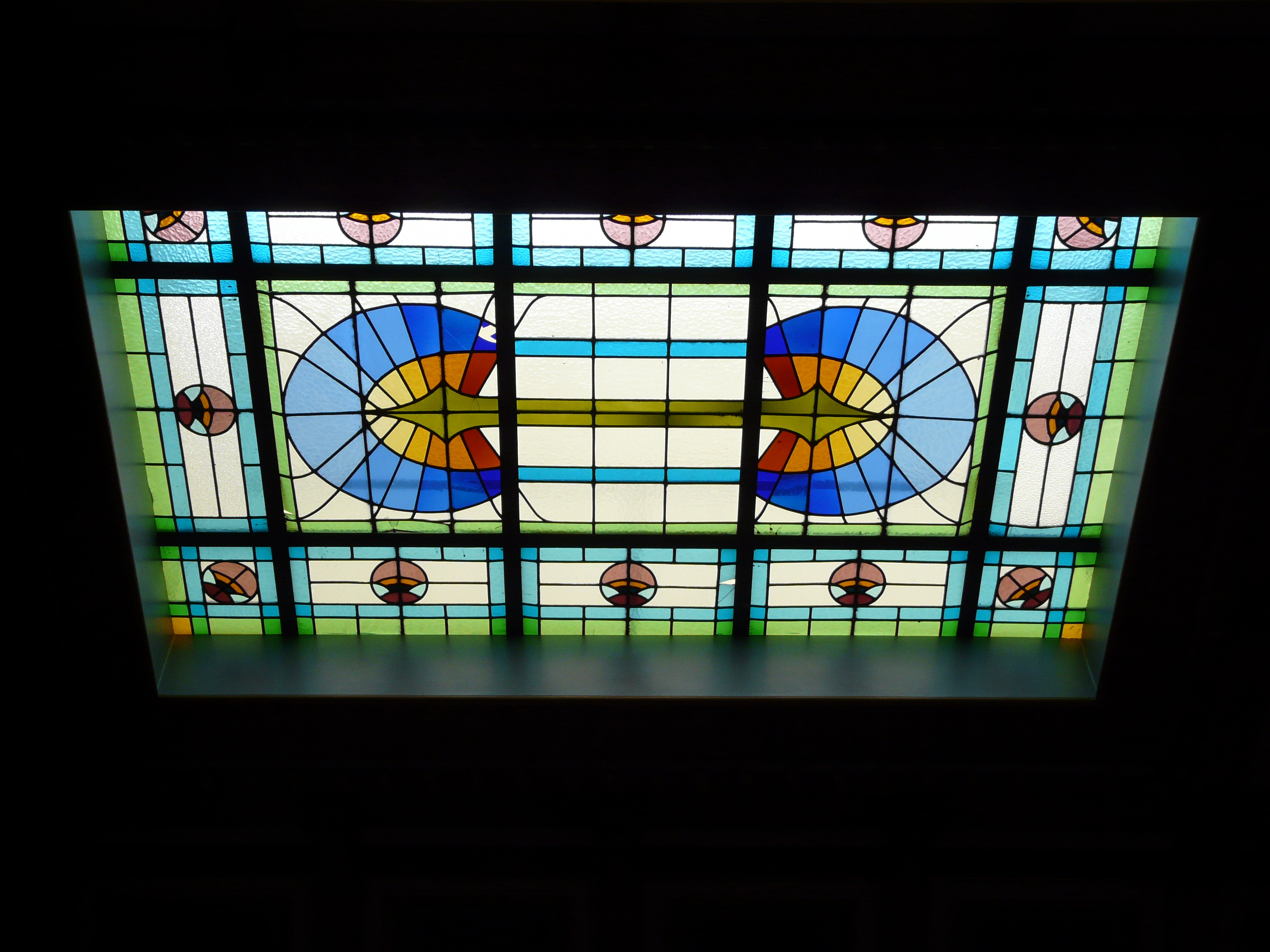 Casa Elizalde (Barcelona)